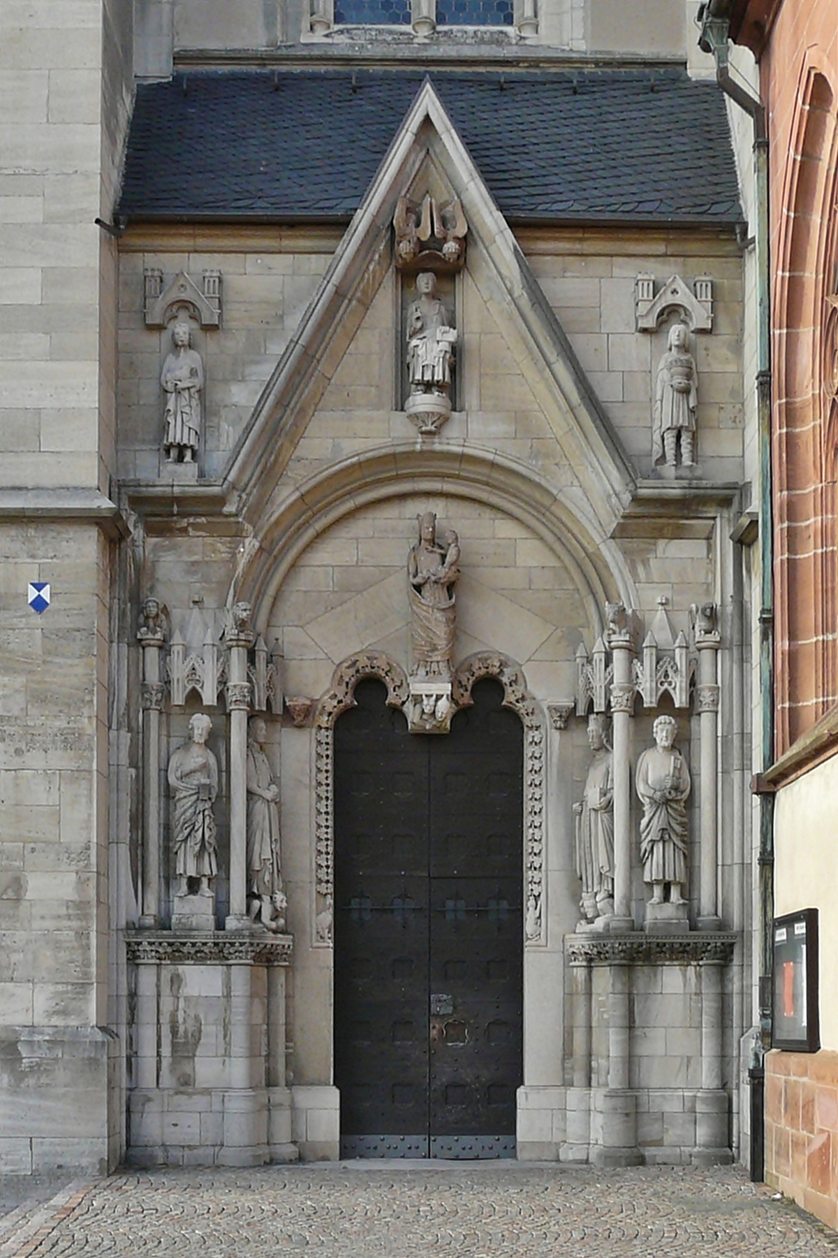 Das Hauptportal am Wetzlarer Dom, Wetzlar (Hessen)